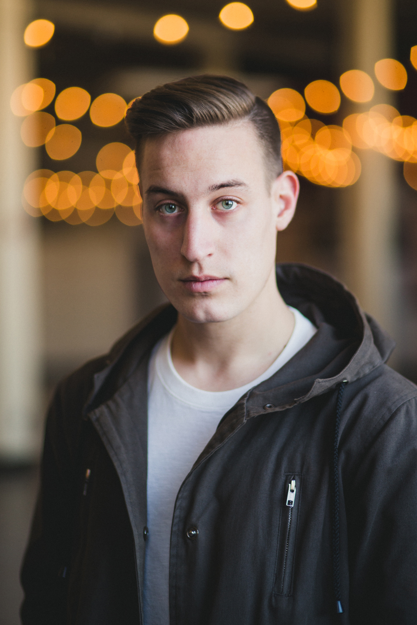 Paul Marc Rousseau, guitarist for Silverstein